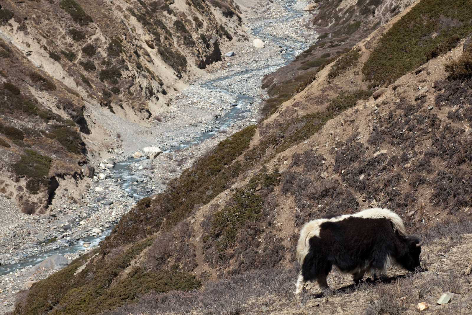 Yak and Kone Khola